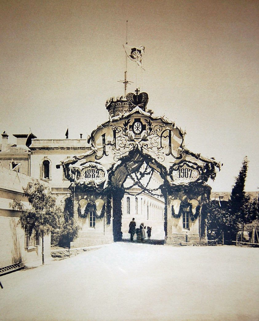 Флаг ИППО и праздничный вензель Императору Николаю II в 25-летие юбилея ИППО в Иерусалиме в 1907 году. Фото Ф.М. Тимона. 1907 г.